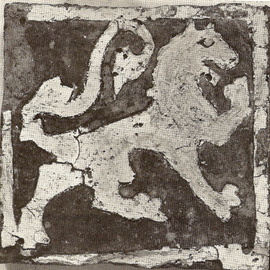 Fußbodenfliese des 14. Jahrhunderts mit Darstellung eines Löwen aus dem Haus der Löwenapotheke in Lübeck. Im Besitz des St.-Annen-Museums in Lübeck.